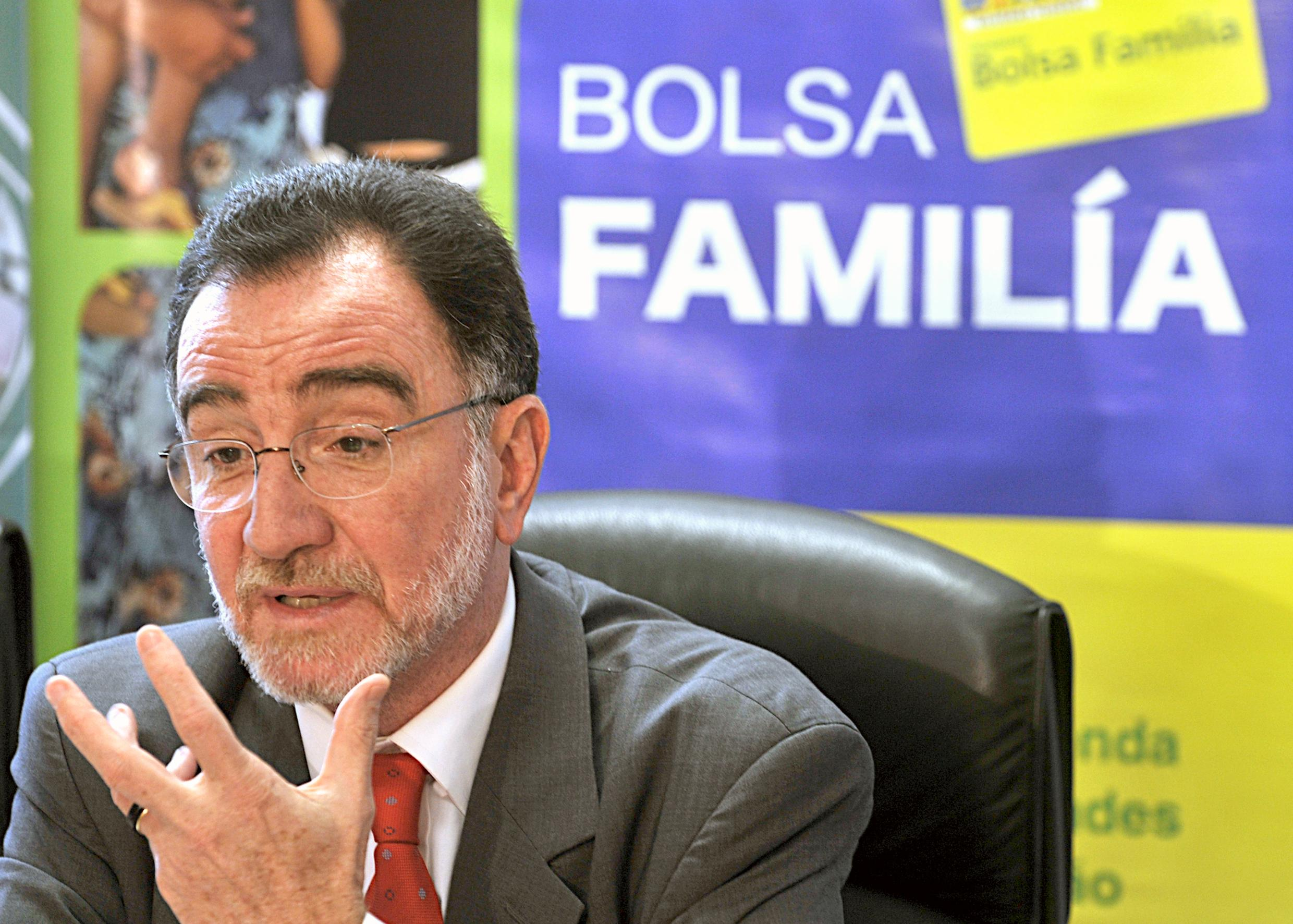 Brasília- O ministro do Desenvolvimento Social e Combate à Fome, Patrus Ananias, conversa com os jornalistas sobre o novo sistema de monitoramento do Bolsa Família Foto: Marcello Casal JR/ABr